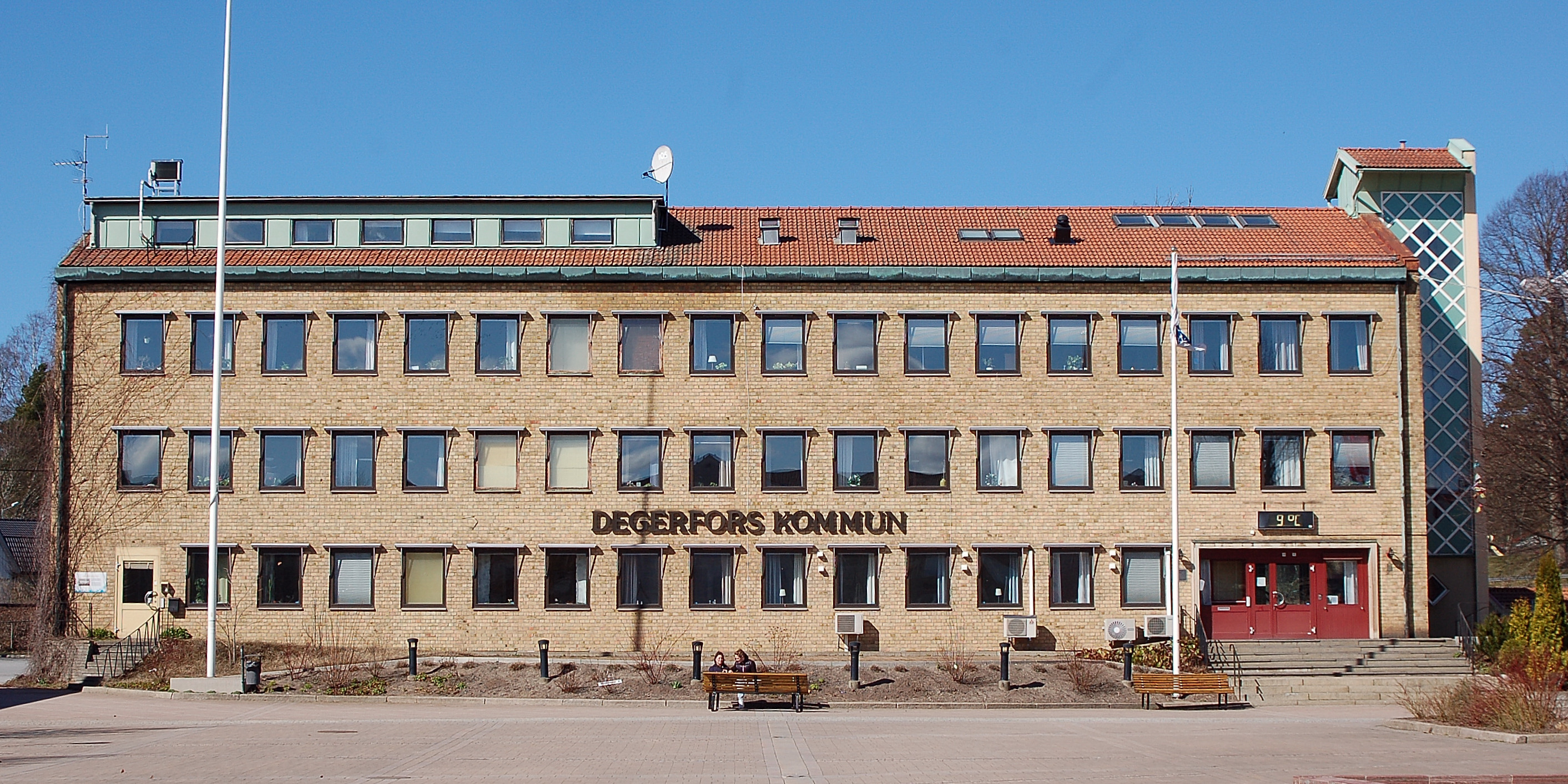 Degerfors Kommunalkontor vid torget i Dergerfors.